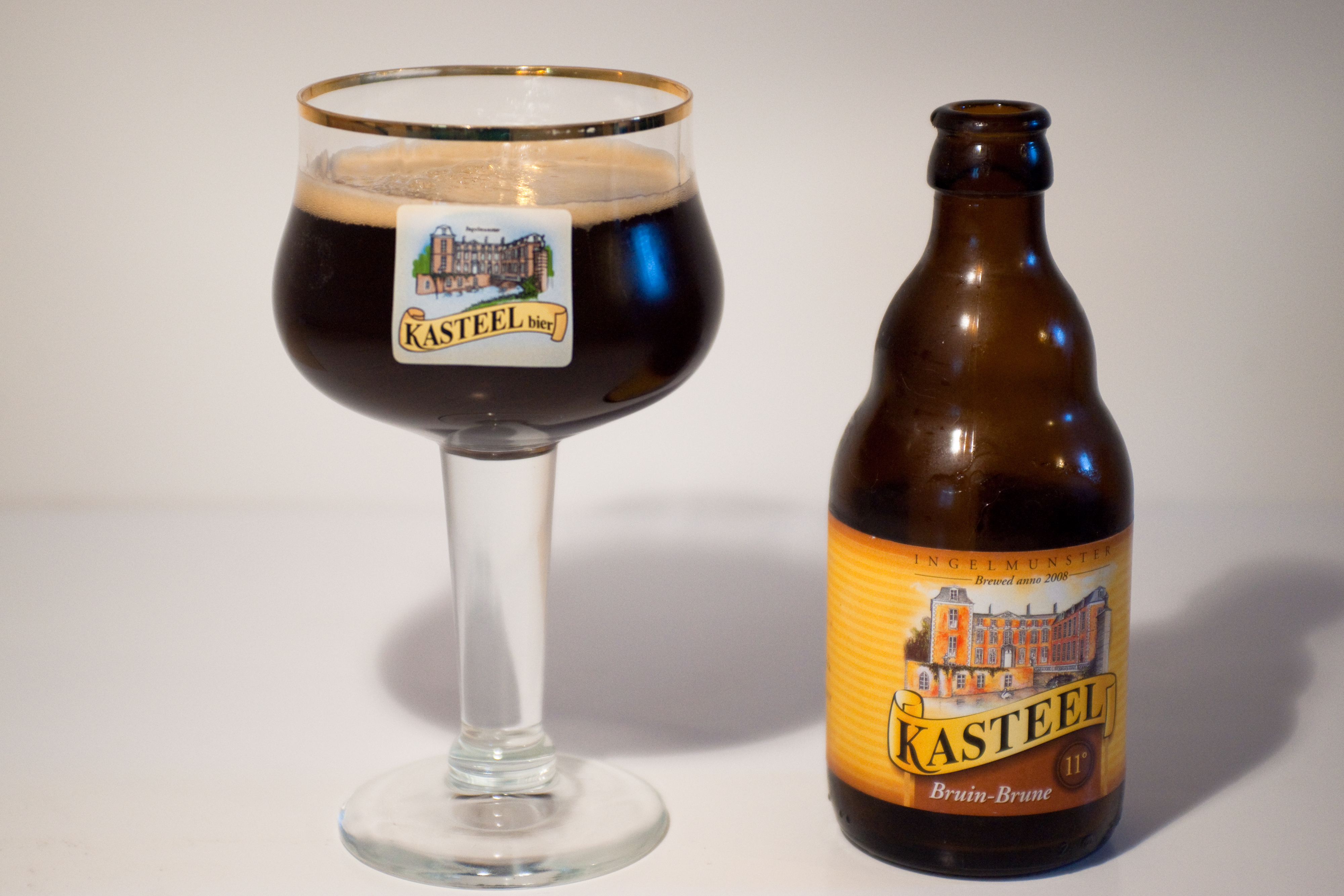 Bière et verre de Kasteel.